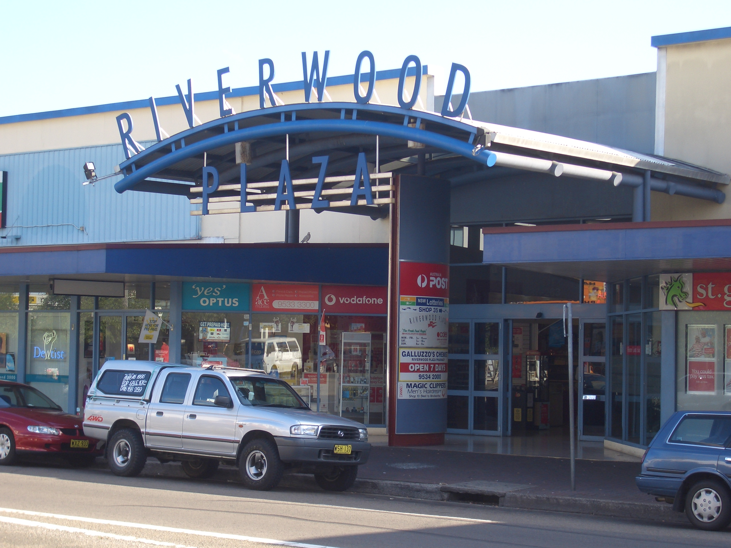 Riverwood_Plaza